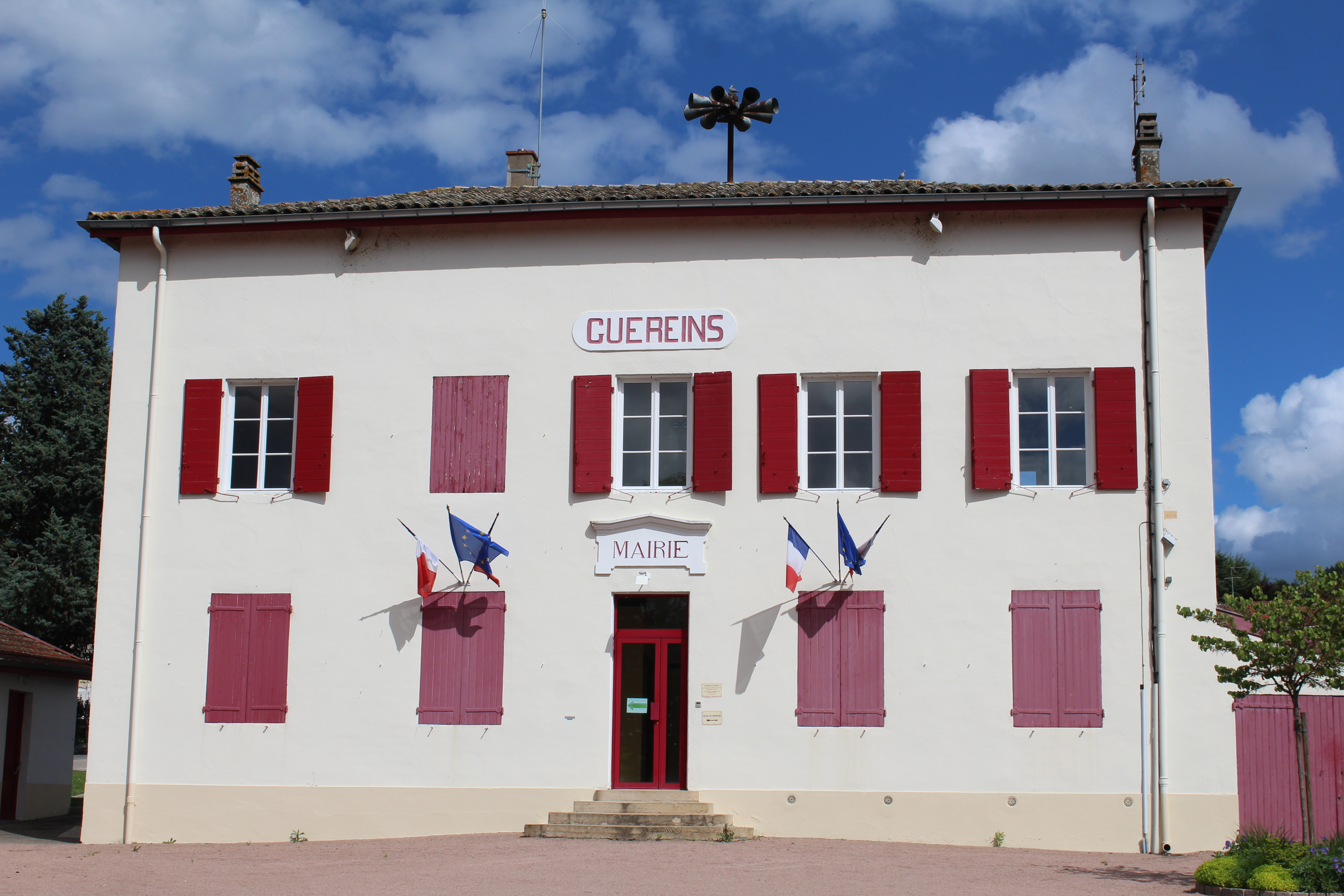 Mairie de Guéreins.